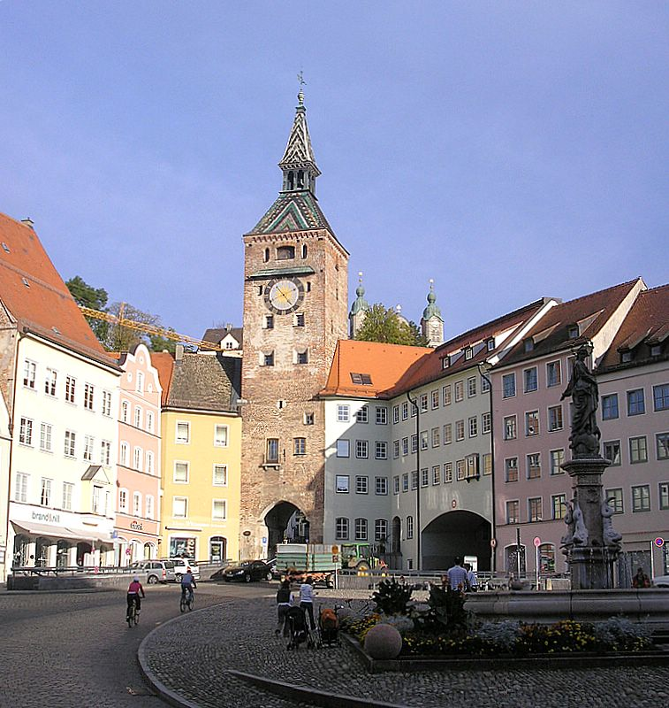 Landsberg am Lech (Oberbayern). Marktplatz und „Schöner Turm“. Eigene Aufnahme, Okt. 2006 / Landsberg am Lech (Upper Bavaria, Germany). Market place and „Schoener Turm“ (“Beautyful tower”). Own photo, Oct. 2006